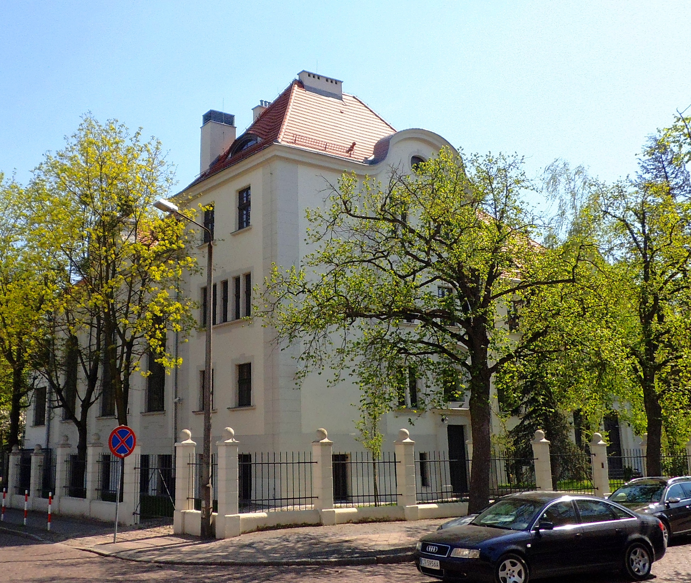 Budynek WFOŚiGW w Toruniu1